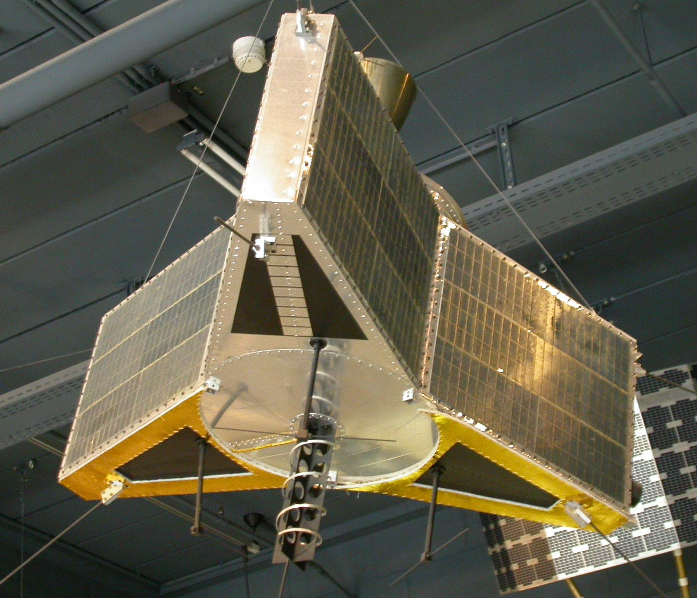 Modell des Amateurfunksatelliten Amsat-Oscar 10, im Deutschen Museum in München